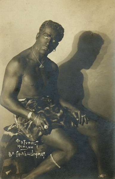 Фотография Владимир Гольцшмидта в образе аборигена. 13,8 х 9 см. На обороте штамп художественной фотографии А. Горнштейна